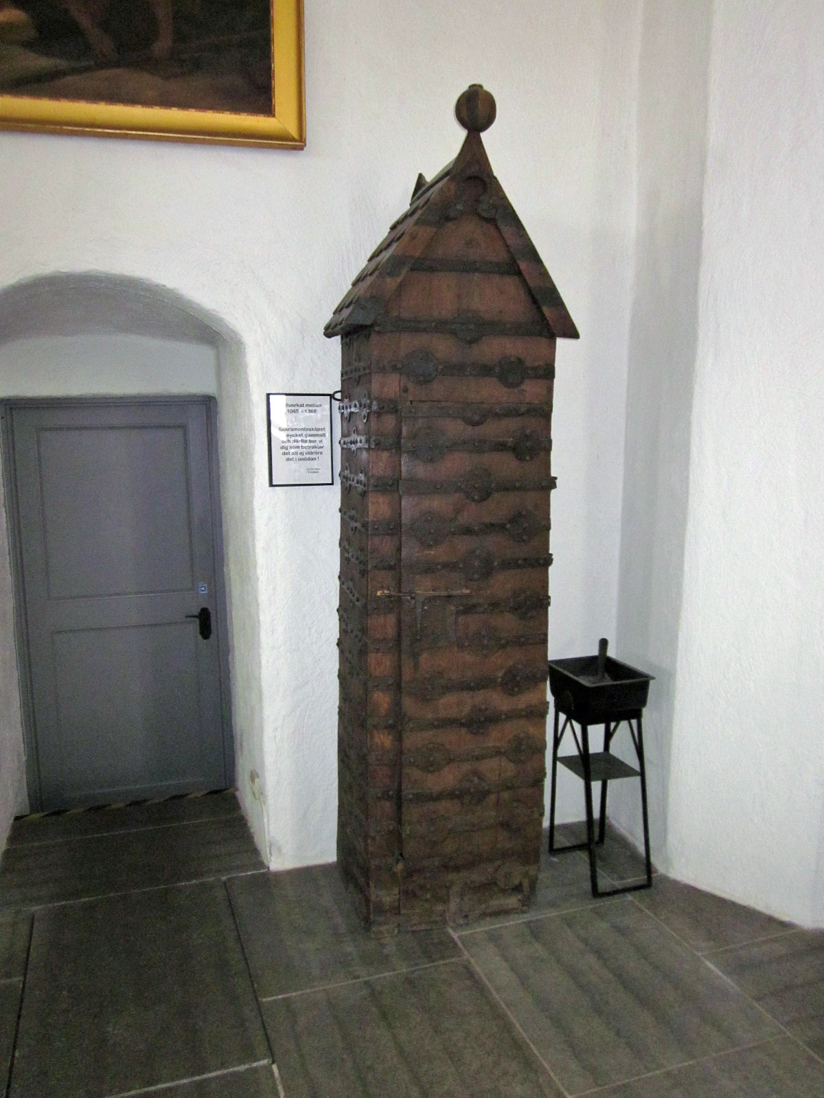 Sakramentskåpet i Torsåkers kyrka.